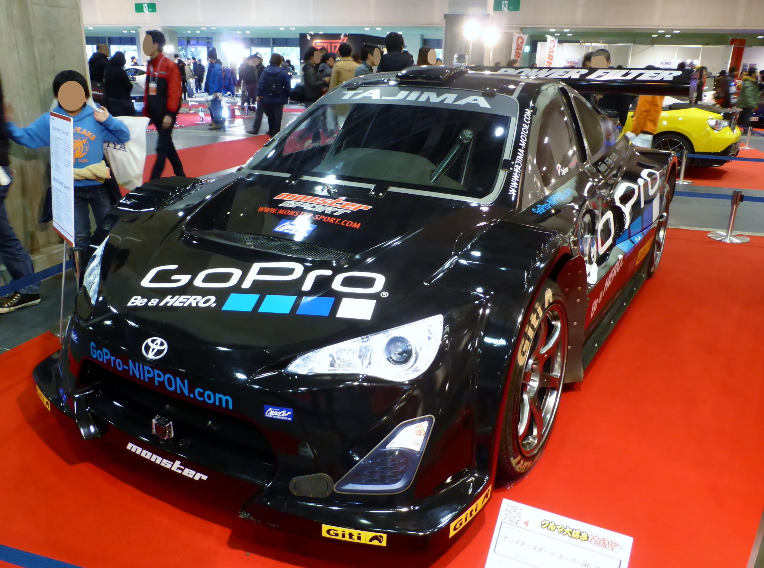 大阪オートメッセ2014においてモンスタースポーツスーパー86を撮影。